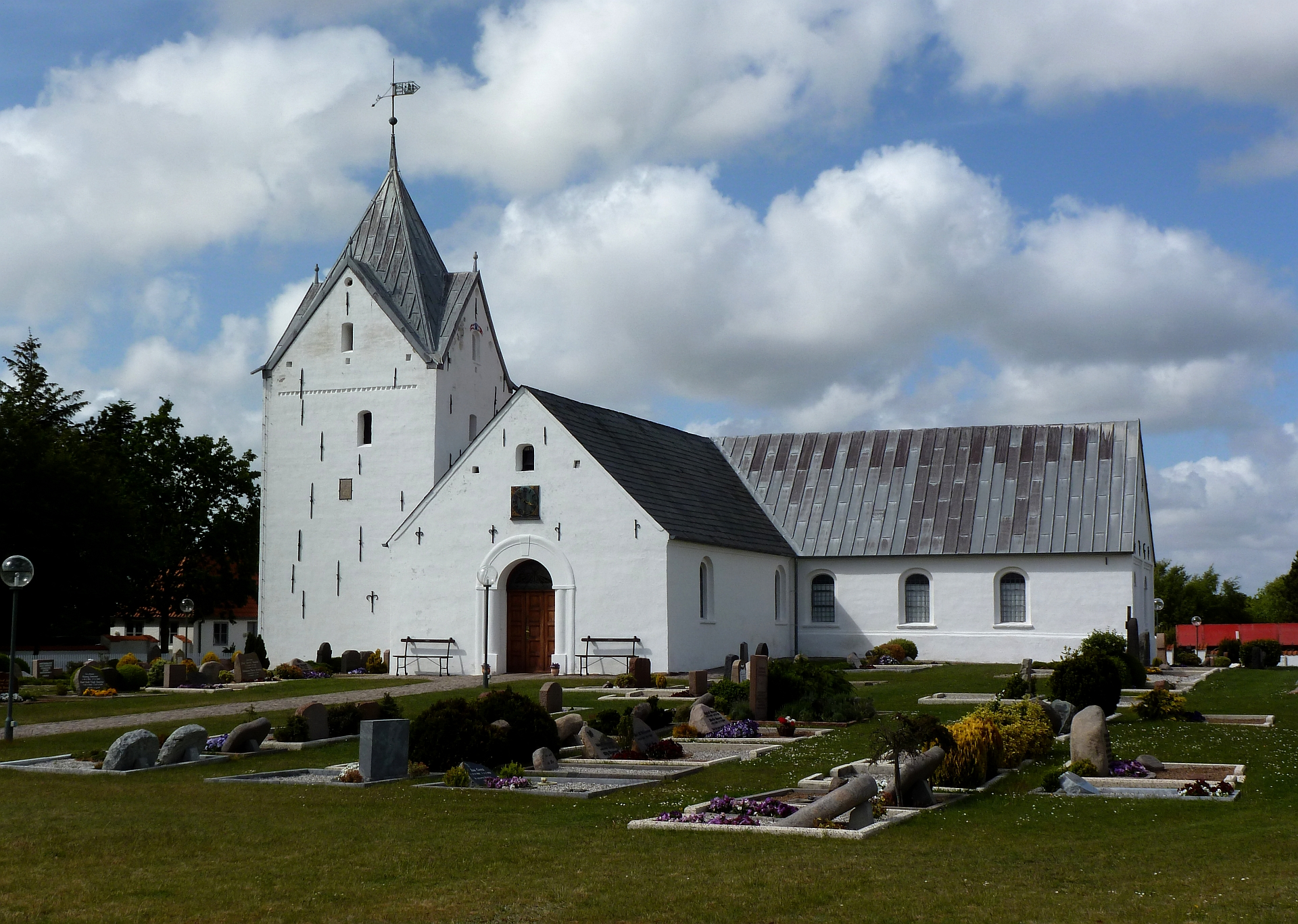 Sankt Clemens Kirke (Rømø Kirke) mit Kirchfriedhof im Mai 2011.